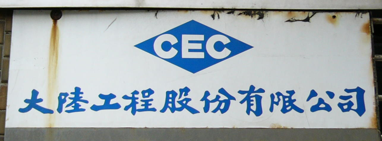 中文（台灣）: 臺北市大安區光復南路，華視媒體園區附近，大陸工程公司第一代商標牌。